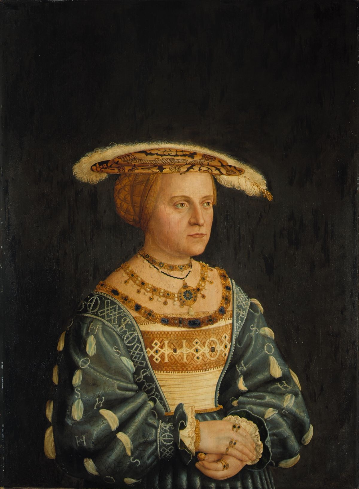 Person: Susanna, Herzogin von Pfalz-Neuburg, verw. Markgräfin von Brandenburg-Kulmbach, geb. Herzogin von Bayern, * 2. 4. 1502 wahrscheinlich in München, † 23. 4. 1543 in Neuburg a. d. Donau, Grabstätte in der Frauenkirche, München. Teil der „großen Wittelsbacher-Serie“, Auftraggeber der Serie, Herzog Wilhelm IV. Die Fürstin trägt ein blaues Kleid, dessen Brustlatz die Initialen ihres Ehemannes „O“ und „H“ in Perlenstickerei zieren. Auch ihr Kleid ist mit den Initialen des Herrscherpaares „S“ (Susanna), „H“ (Heinrich) und „O“ (Otto) bestickt. Über dem Haarnetz aus Goldschnüren trägt sie ein flaches Barett aus Brokatstoff mit weißer Feder. Die kostbaren Kolliers, das Goldarmband und die zahlreichen Ringe an den ineinander gelegten Händen machen Susanna zur aufwändigst ausgestatteten Fürstin innerhalb der Bildnisreihe. Das Pendant ist das Porträt ihres Gemahls, des Pfalzgrafen Ottheinrich (Bayerische Staatsgemäldesammlungen Inv.-Nr. 2449) Tochter von Herzog Albrecht IV. von Bayern und Kunigunde von Österreich; Schwester von Wilhelm IV., Ludwig X., Ernst (Administrator in Salzburg und Passau), Sibylle (Frau von Ludwig V. von der Pfalz) und Sabina (Frau von Ulrich von Württemberg); Nichte von Kaiser Maximilian I.; seit 1518 verheiratet mit Markgraf Kasimir von Brandenburg-Kulmbach; seit 1529 verheiratet mit Pfalzgraf Ottheinrich. Susanna von Bayern war in erster Ehe mit Markgraf Kasimir von Brandenburg-Kulmbach verheiratet. Aus der Ehe gingen fünf Kinder hervor. Nach dem Tod Kasimirs (1527) heiratete Susanna den Pfalzgrafen Ottheinrich, wodurch die Beziehungen zwischen den bayerischen und pfälzischen Wittelsbachern wieder vertieft werden sollten. Die Konversion ihres Mannes zum lutherischen Glauben 1542 vollzog Susanna nicht mit, sie blieb katholisch.